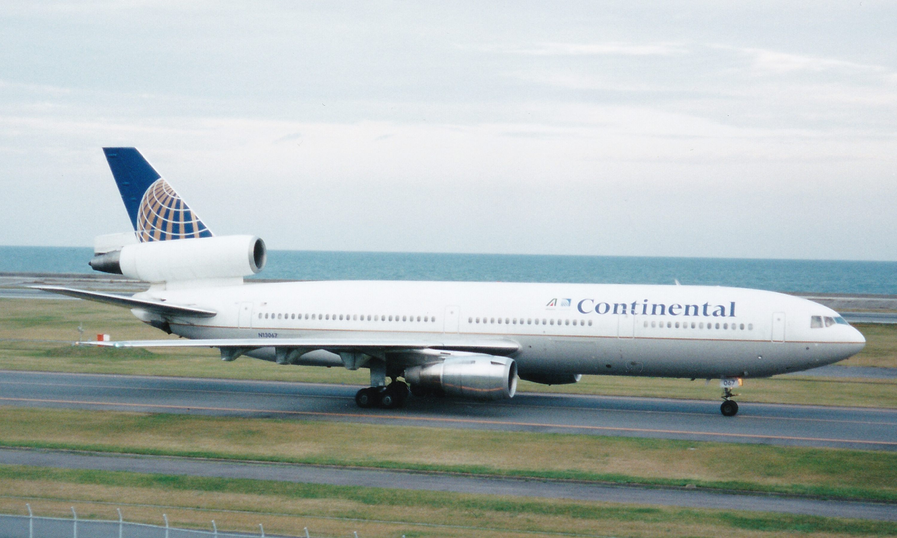 コンチネンタル航空 DC10 （大分空港、1996年）